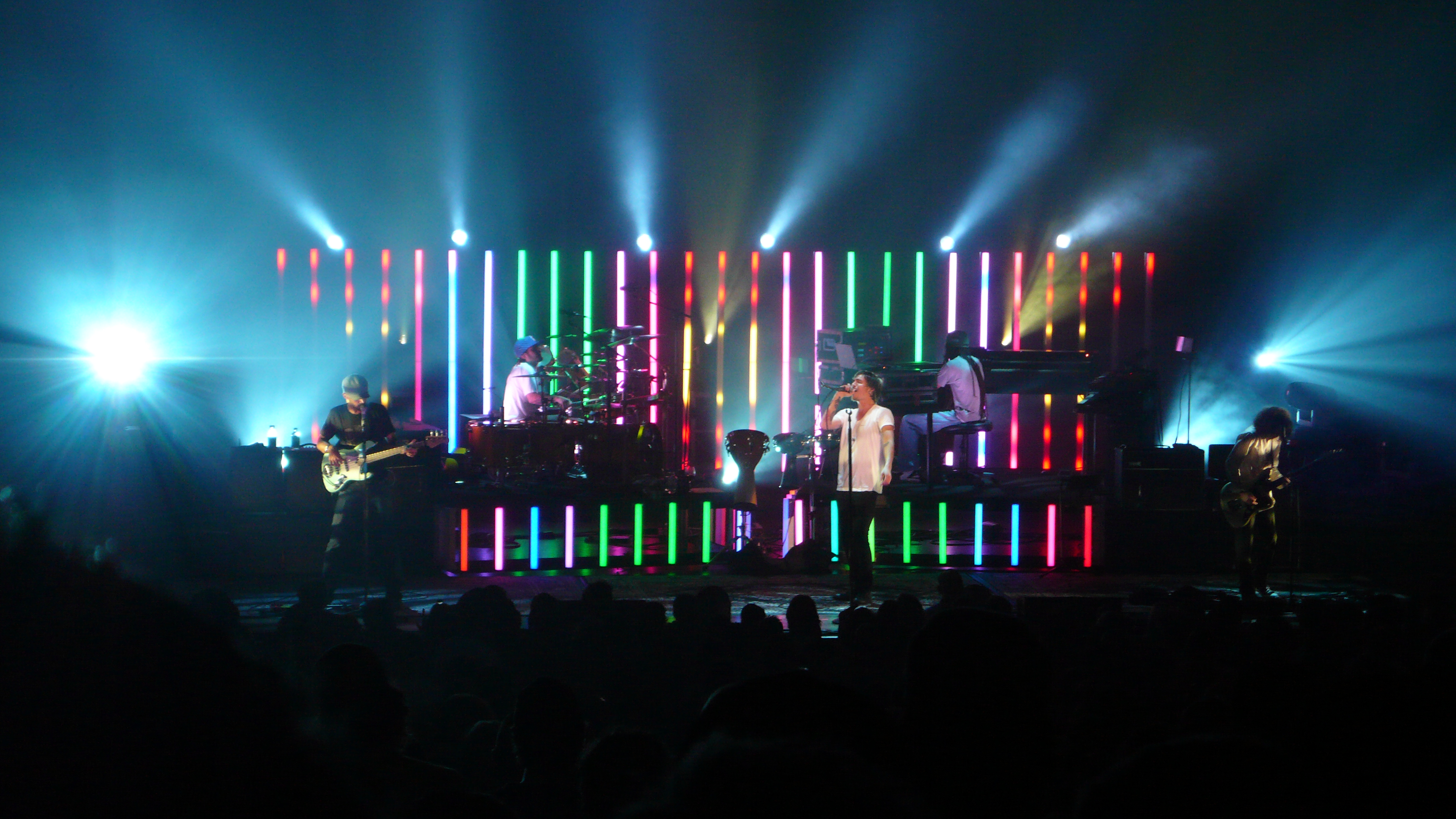 Incubus liveP1020581